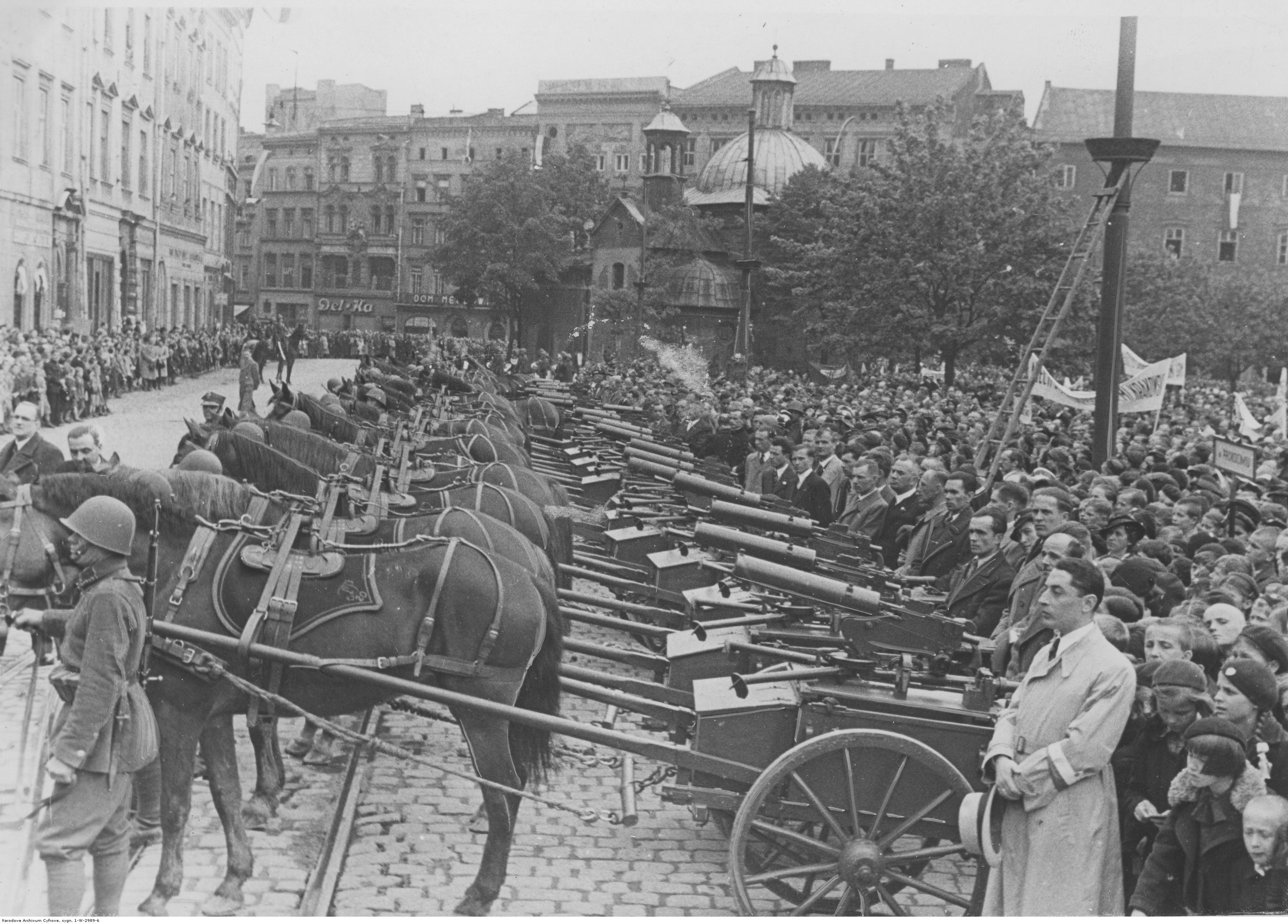 Przekazanie sprzętu wojskowego 20 Pułkowi Piechoty Ziemi Krakowskiej, ufundowanego przez ludność powiatu krakowskiego. Mieszkańcy Krakowa na Rynku Głównym obserwują uroczystość przekazania broni 20 Pułkowi Piechoty Ziemi Krakowskiej. Na pierwszym planie widoczne 22 ciężkie karabiny maszynowe 7,92 mm "Browning" wz. 30 na biedkach piechoty. W tle widoczny kościół św. Wojciecha. Koncern Ilustrowany Kurier Codzienny - Archiwum Ilustracji. Sygnatura: 1-W-2989-6